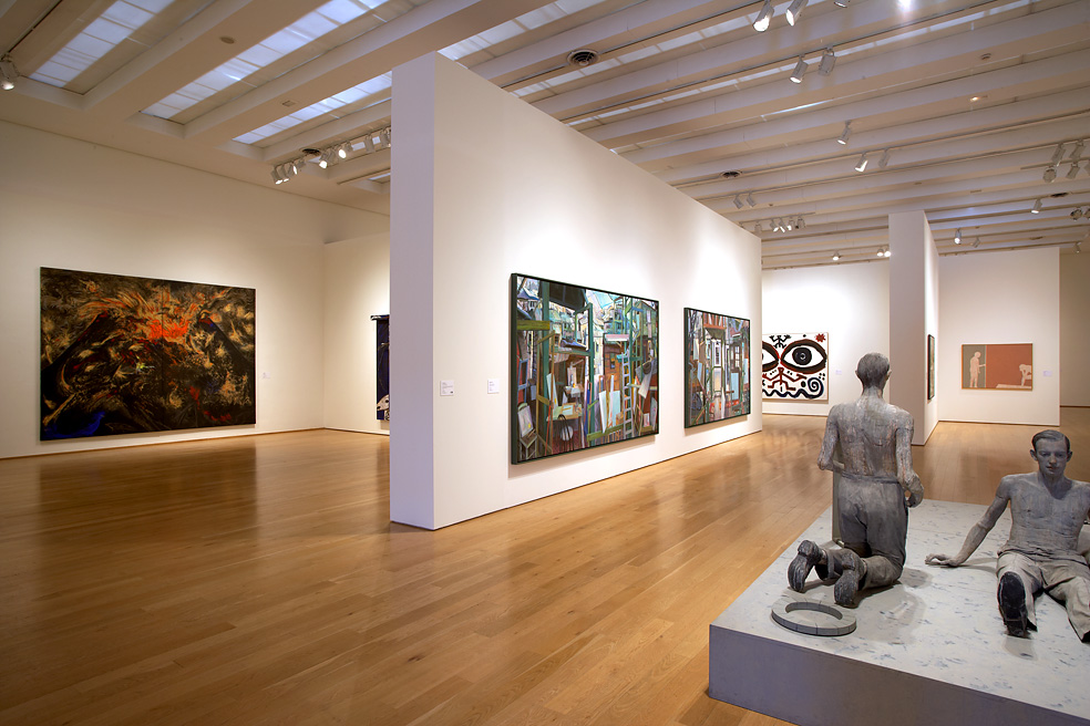 Espacio expositivo de Arte contemporáneo